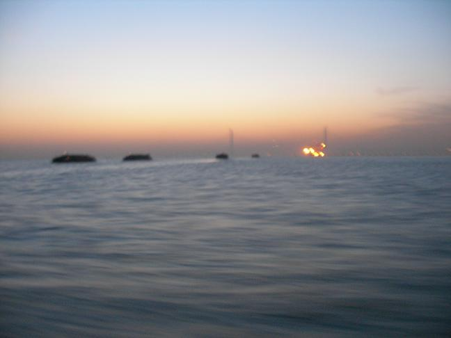 Бродови пловат по Јангцекјанг кон мостот во близина на Нантонг.